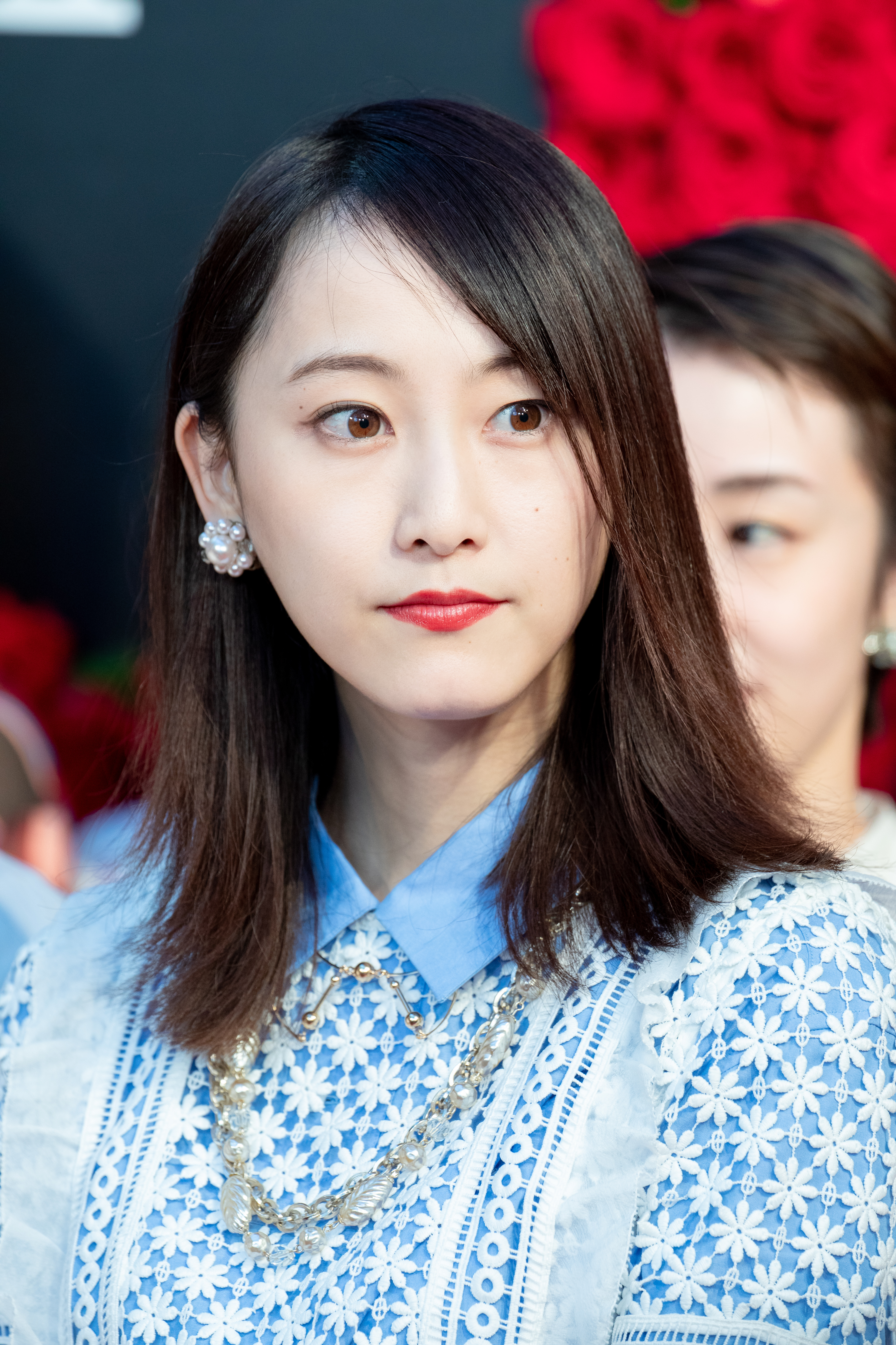 第30回 東京国際映画祭 オープニングセレモニー 松井玲奈 (21世紀の女の子)